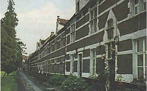 The begiunage of Dendermonde, Belgium